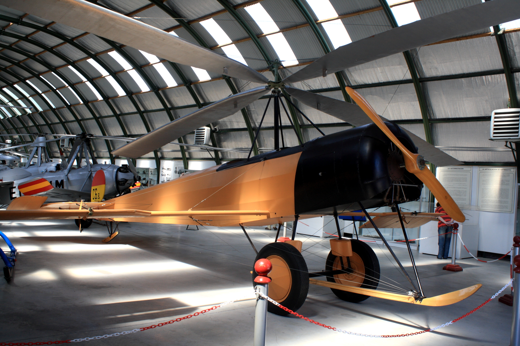 Cierva C.6, Museo de Aeronáutica y Astronáutica de España (Museo del Aire), Madrid, Spain